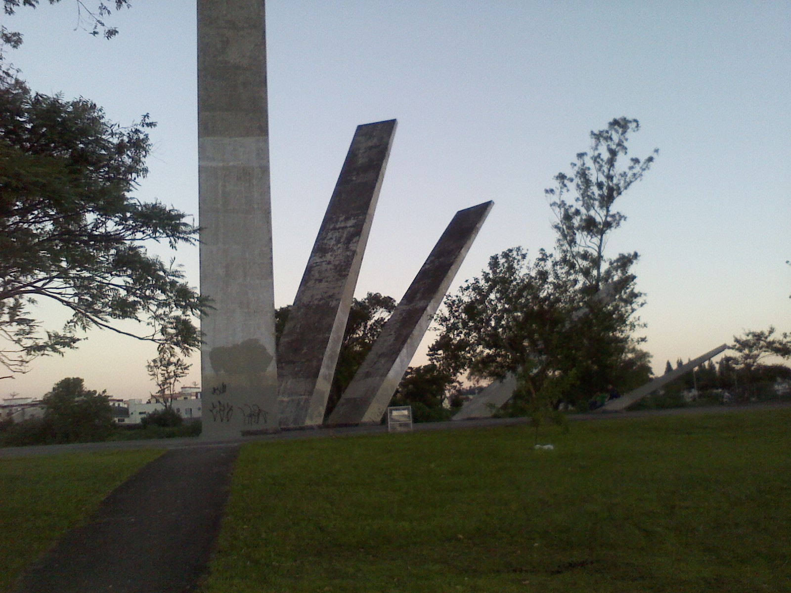 O Monumento às Etnias, Criciúma, SC, Brasil.